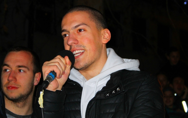 Baka Prase na koncertu u Vranju 29. decembra 2018. godine.